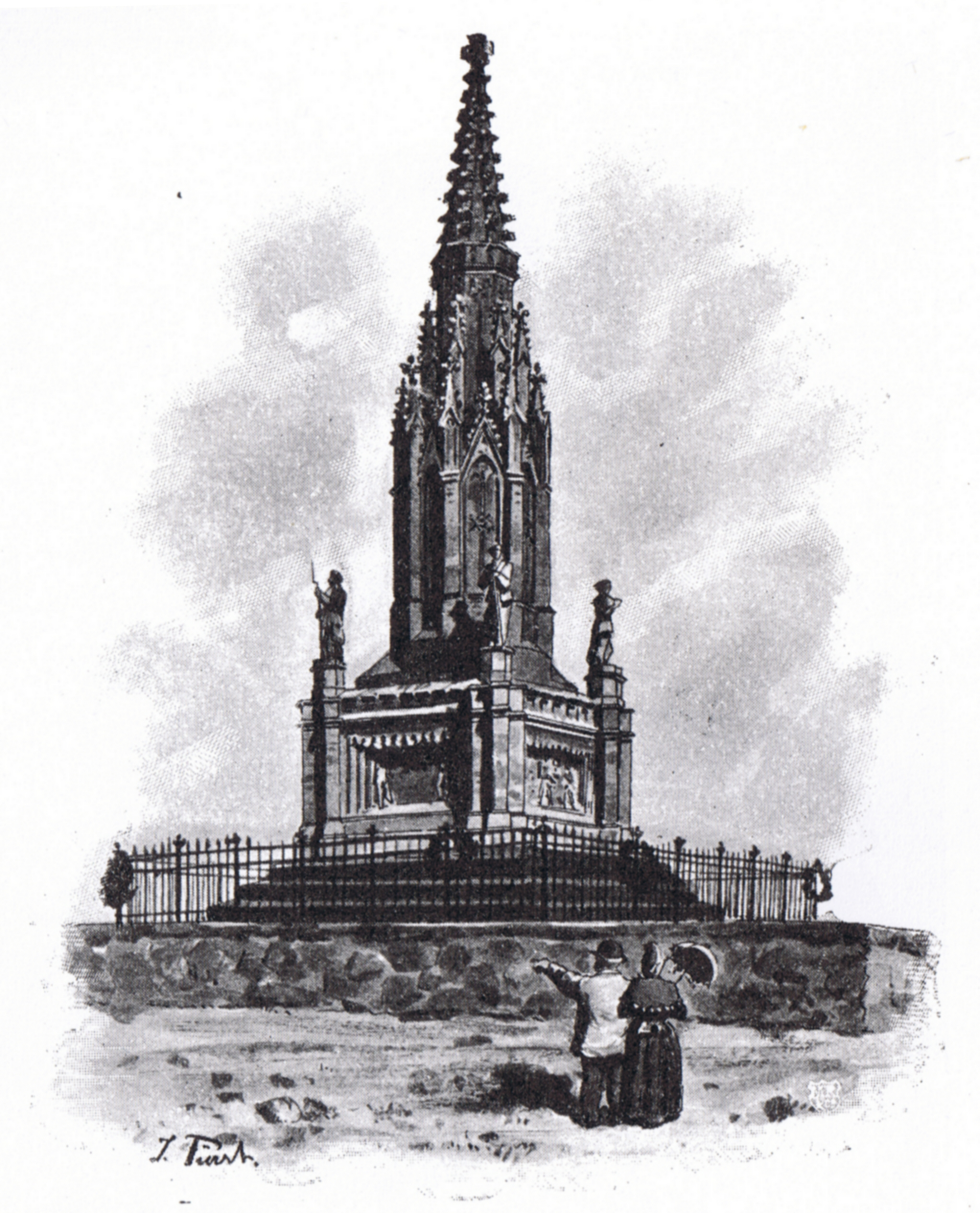 Siegerdenkmal auf den Düppler Höhen, Zeichnung von Julius Fürst um 1895.